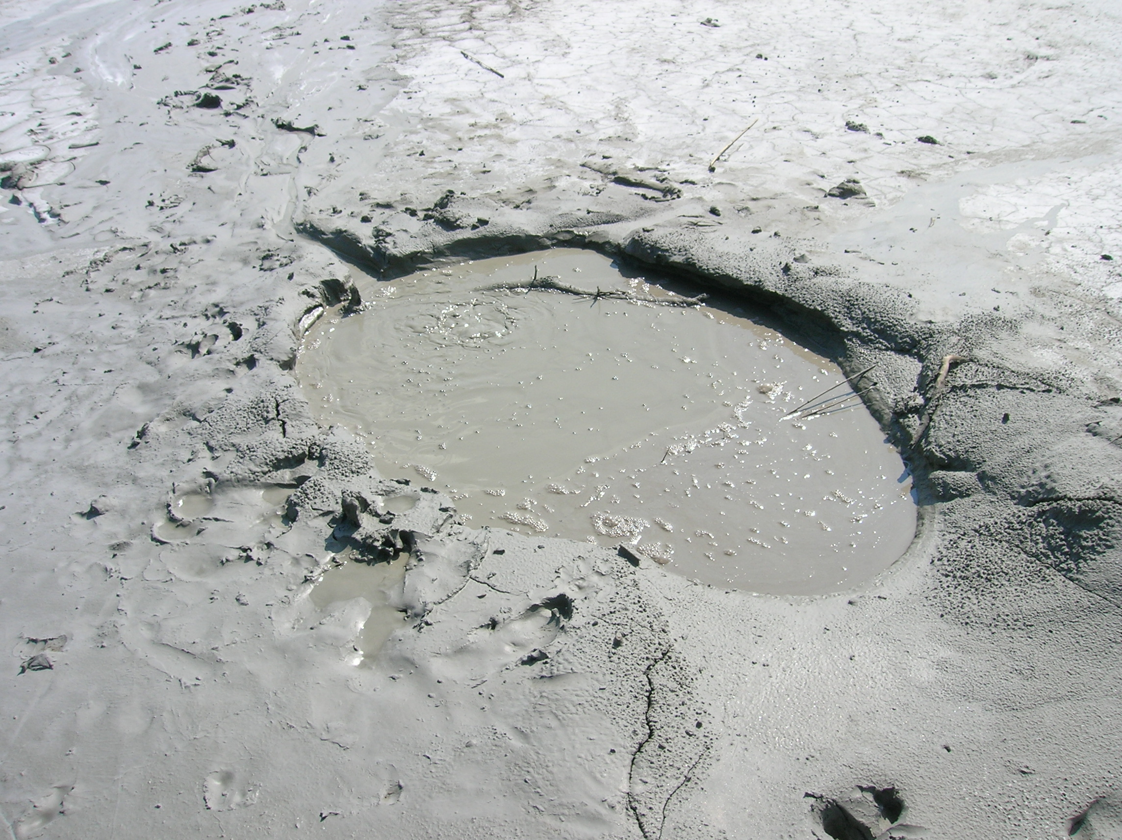 Near village Beciu (Scorţoasa commune)